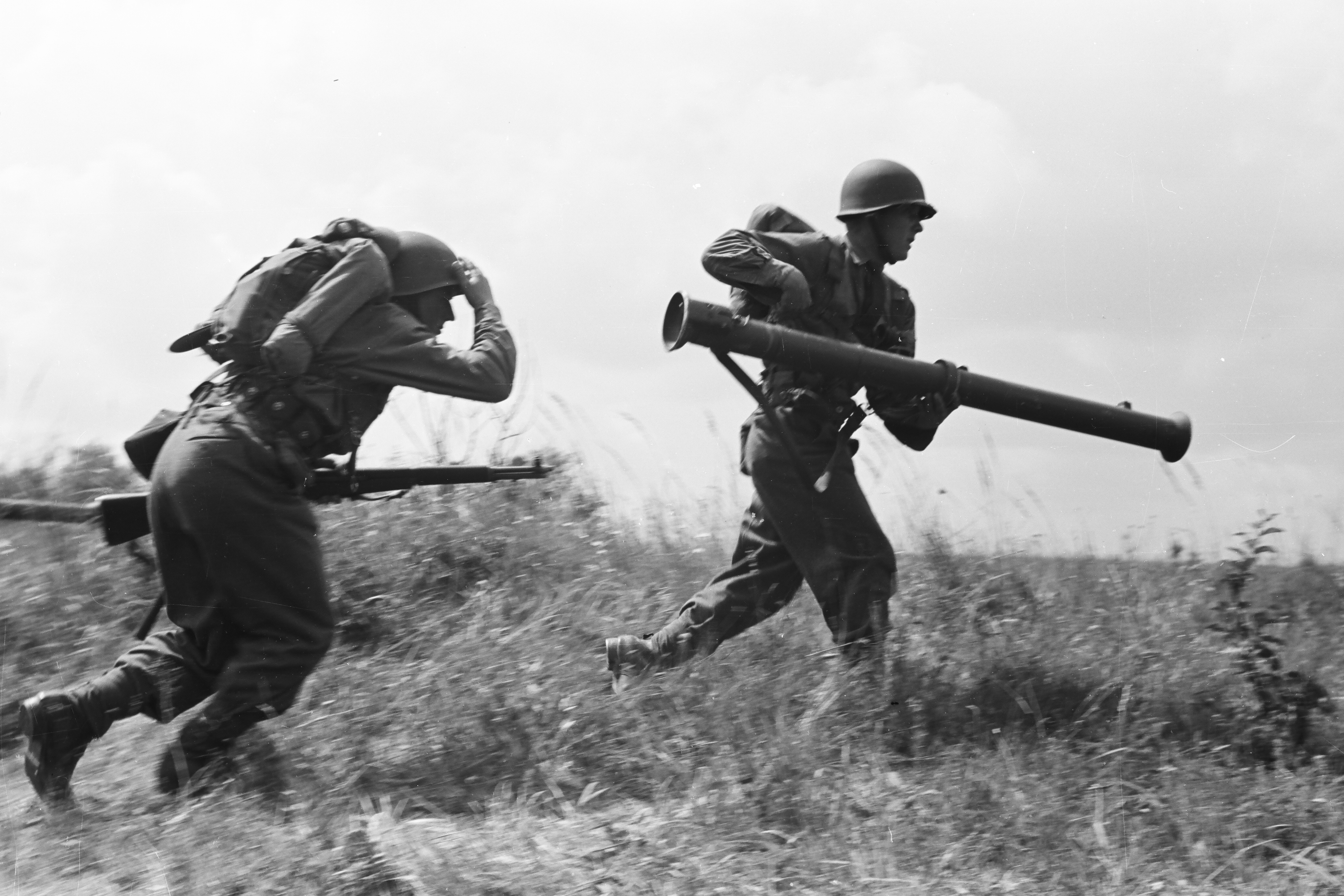 Gefechtsübung der verstärkten 3. Brigade, 1957, Truppenübungsplatz Allentsteig.